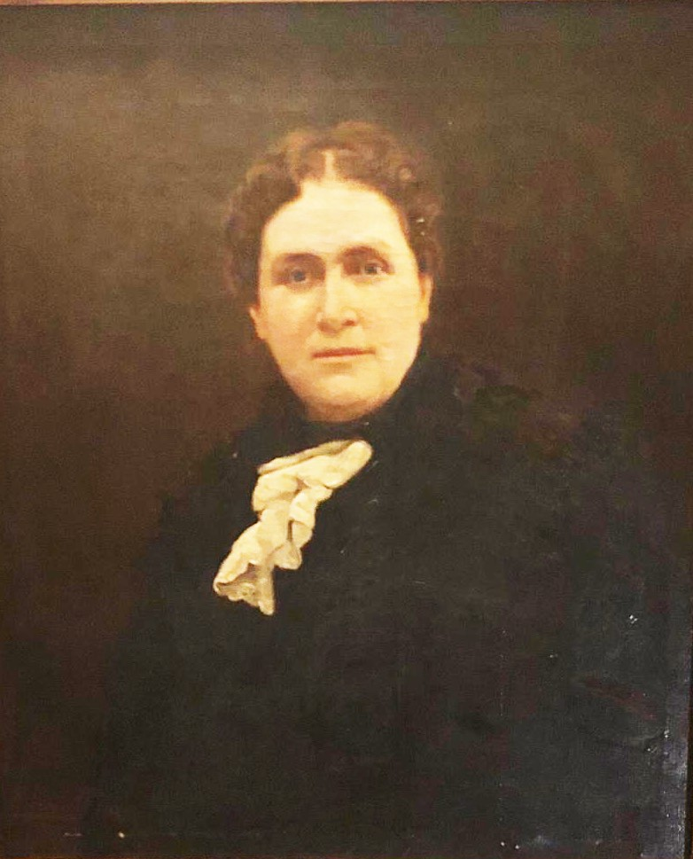 Elena Mackenna Serrano nacío el 20 de febrero de 1849 y fallecío el 18 de Junio de 1920 . Hija de Juan Mackenna Vicuña y de Dominga Serrano Castro. Nieta del general del ejército libertador Chileno Juan Mackenna